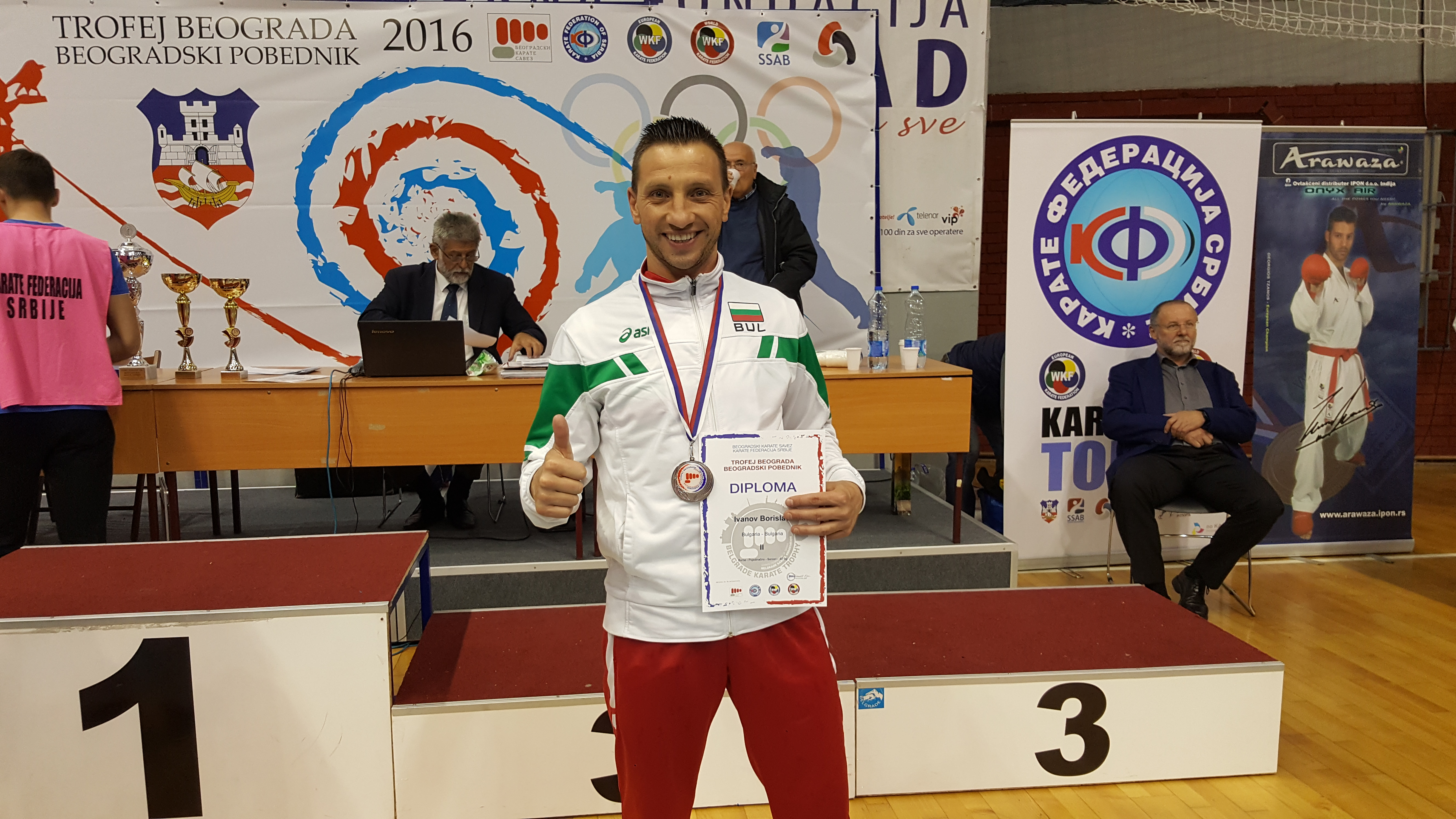 Борислав Иванов 2016г.